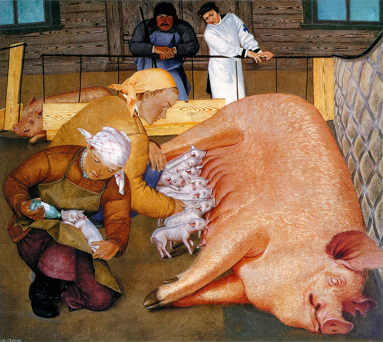 Картина "В свиноводческом совхозе"